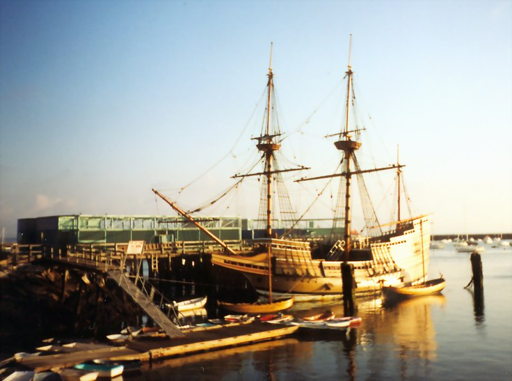 Nachbildung der Mayflower in Plymouth, MA (USA)